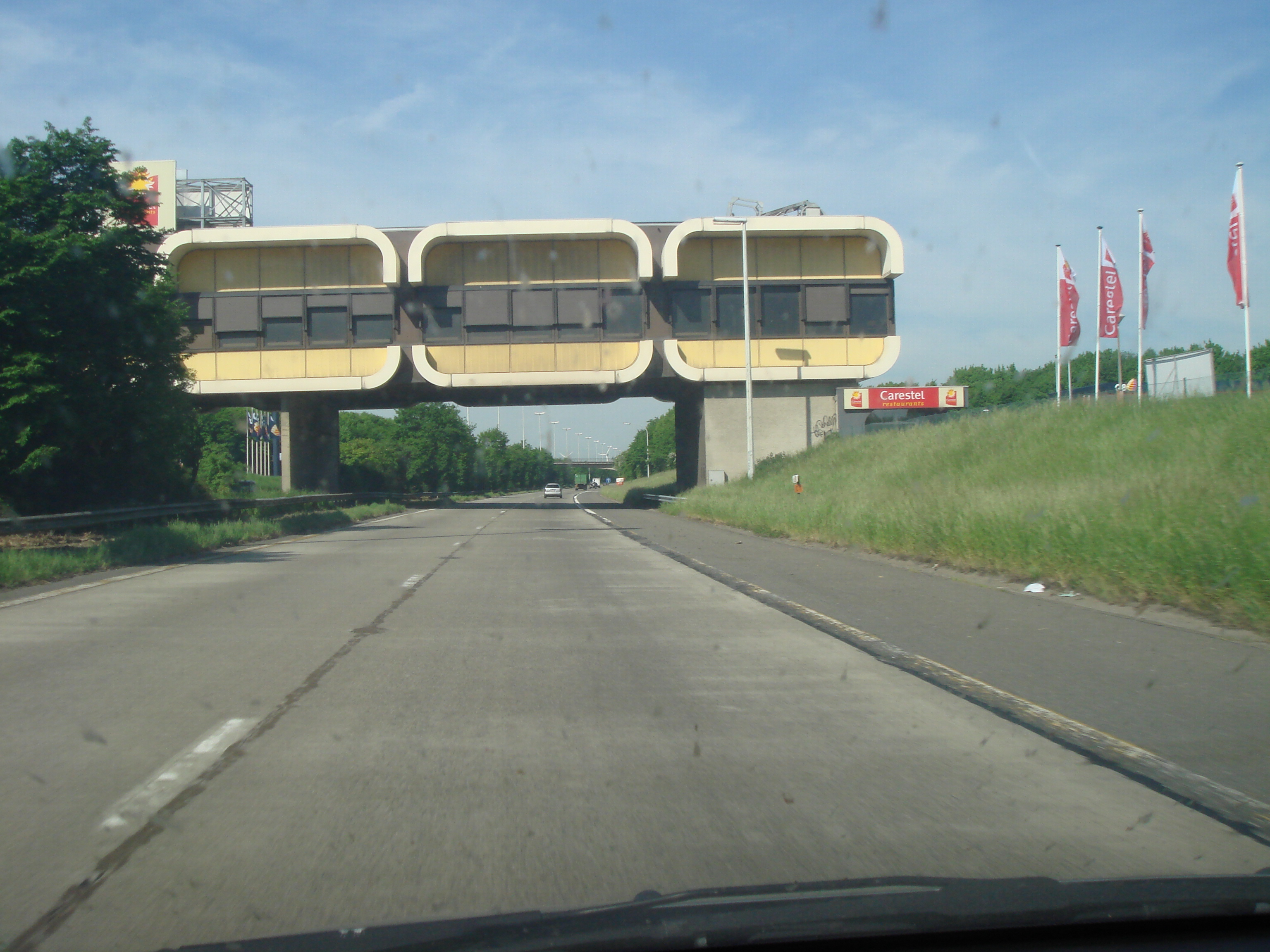 La station service de Verlaine sur l'autoroute belge A15